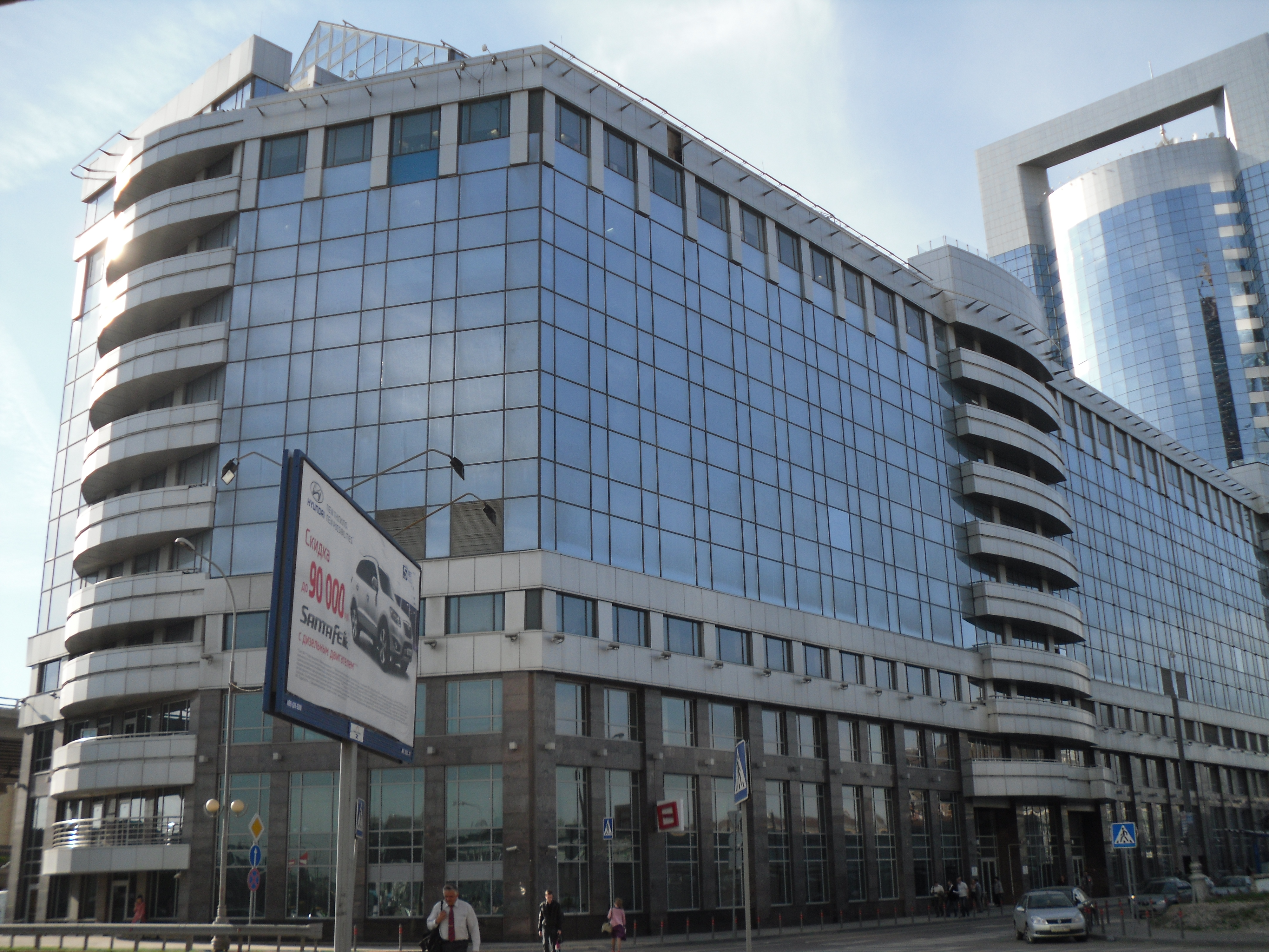 Штаб-квартира компании «ТрансТелеКом» (Москва, ул. Тестовская, 8, бизнес-центр «Северная башня»)